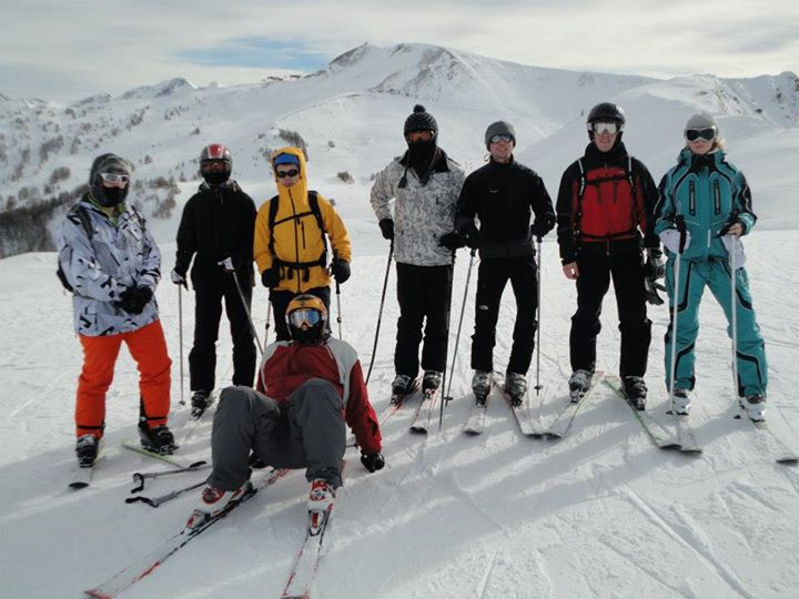 At4Hu Ski